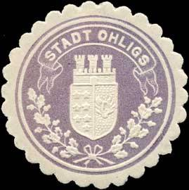 Sealing stamp Title: Stadt Ohligs Description: grau, weiß, geprägt Place: Ohligs size: 4 cm